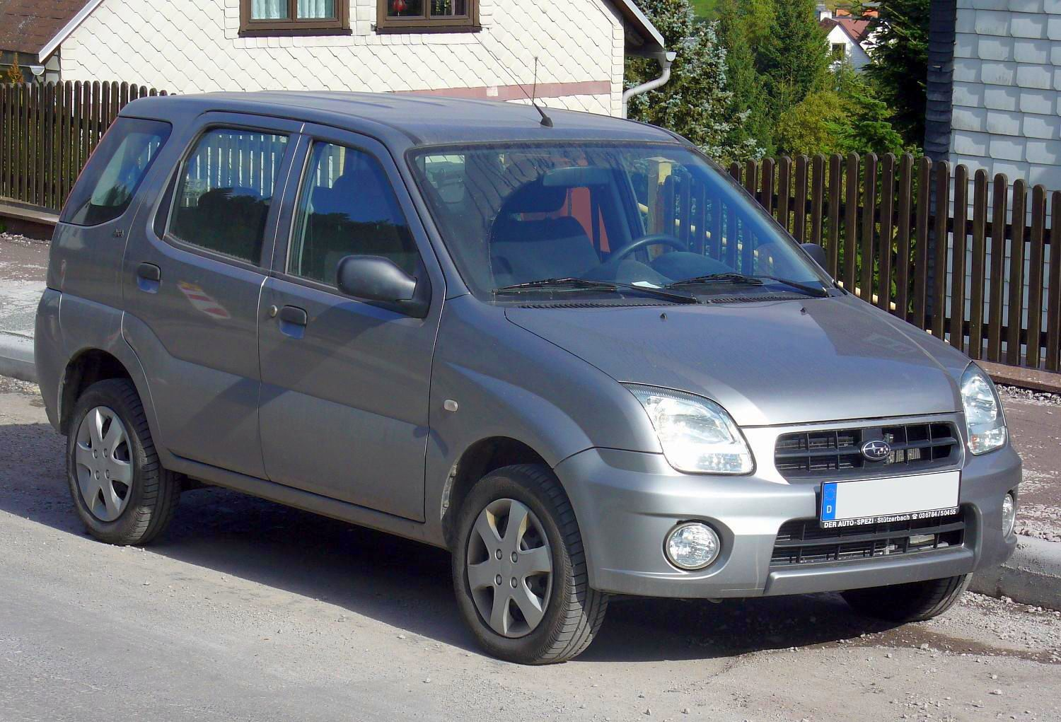 Subaru GX3 Justy